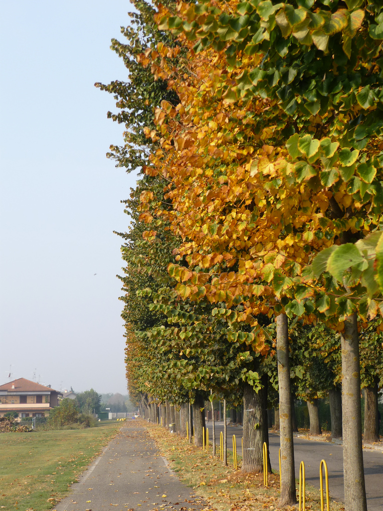 Viale Roma, la via principale di Castiraga Vidardo (LO), caratterizzato dai suoi Tigli storici che lo fiancheggiano su entrambi i lati. Il viale è considerato uno dei simboli del paese.